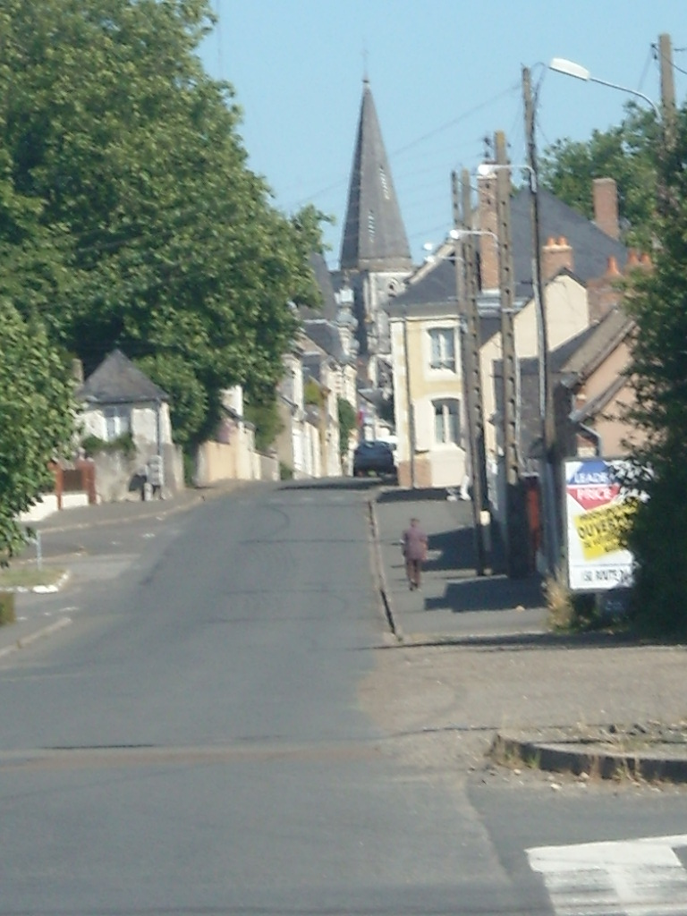 Vue de la rue principale traversant le Grand-Lucé